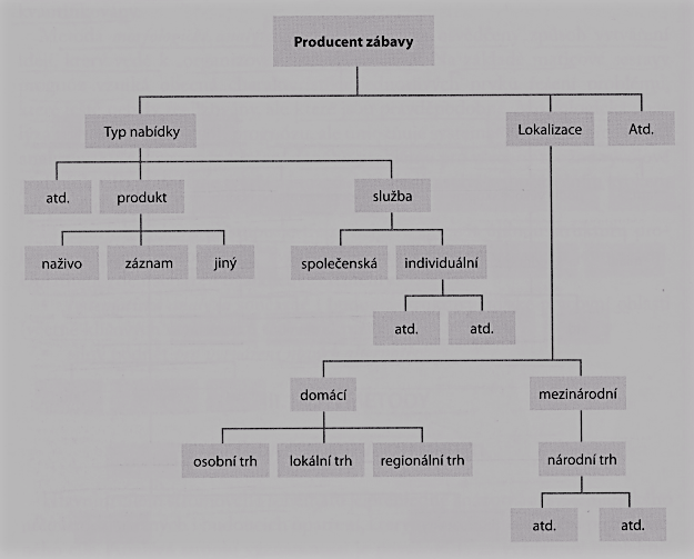 Příklad jednoduchého stromu významnosti s několika základními volbami v několika větvích